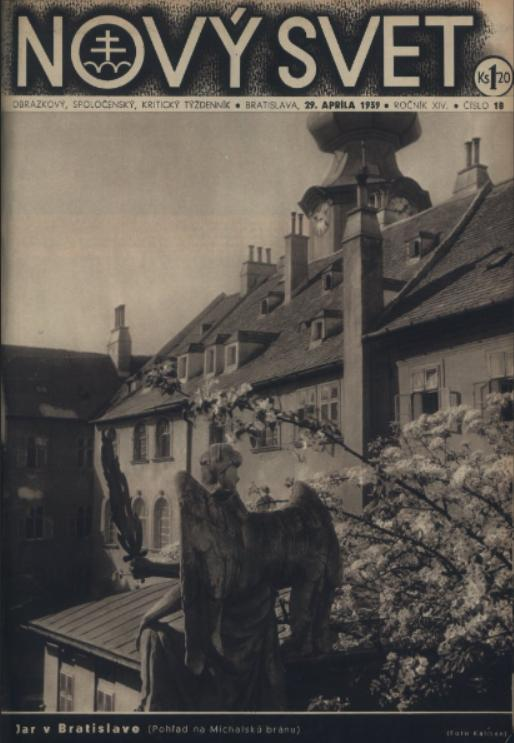 Titulný list týždenníka Nový svet, ktorý vychádzal na Slovensku počas 2 sv. vojny.